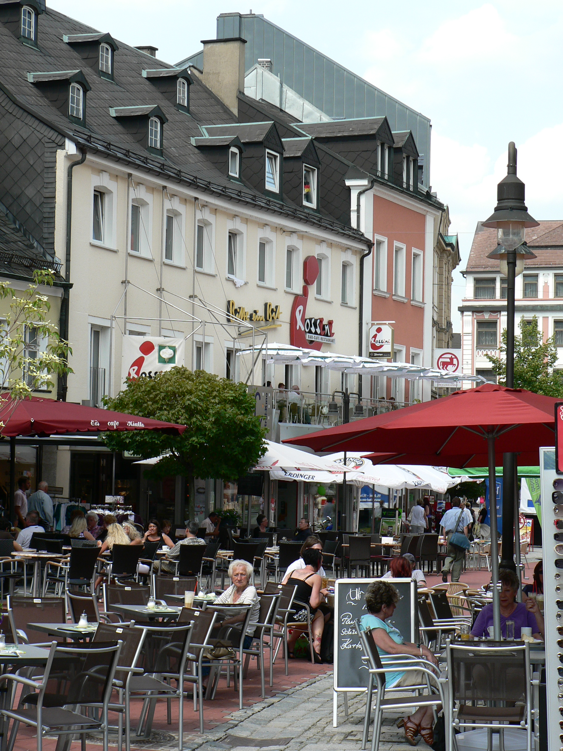 eigene Datei